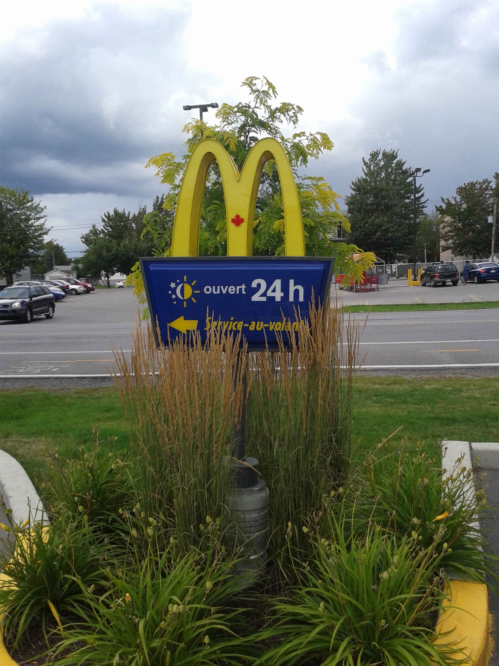 Service au volant Mcdo